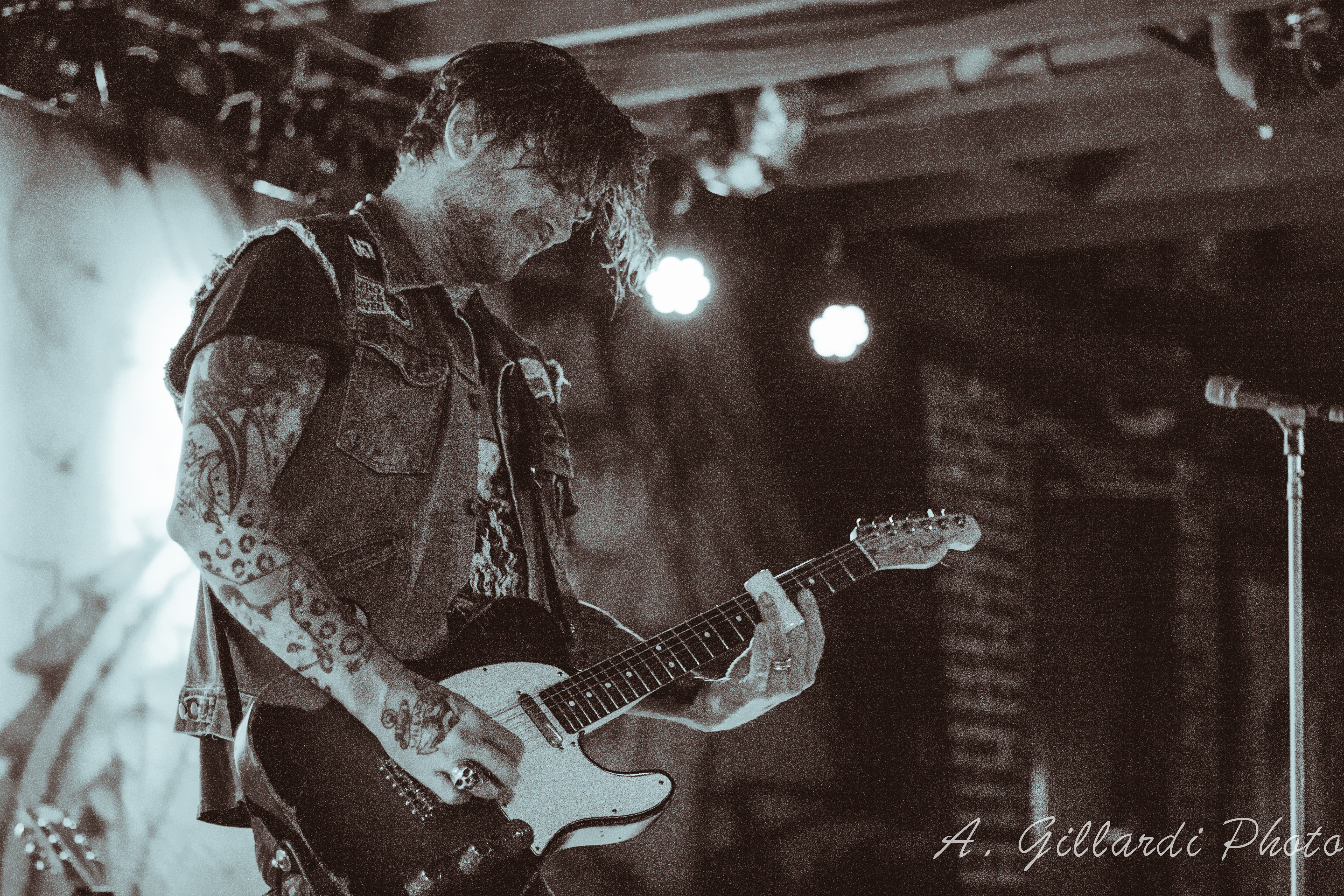 Butch_Walker-4120